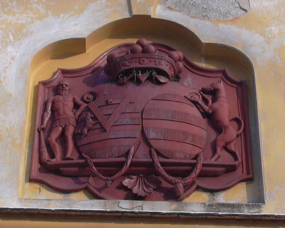 Znak markýze Františka Josefa z Lusignan na hřbitovní kapli svatého Josefa, Ivanovice na Hané, Česká republika.